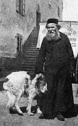 Pierre Chanoux (1828-1909), botanich